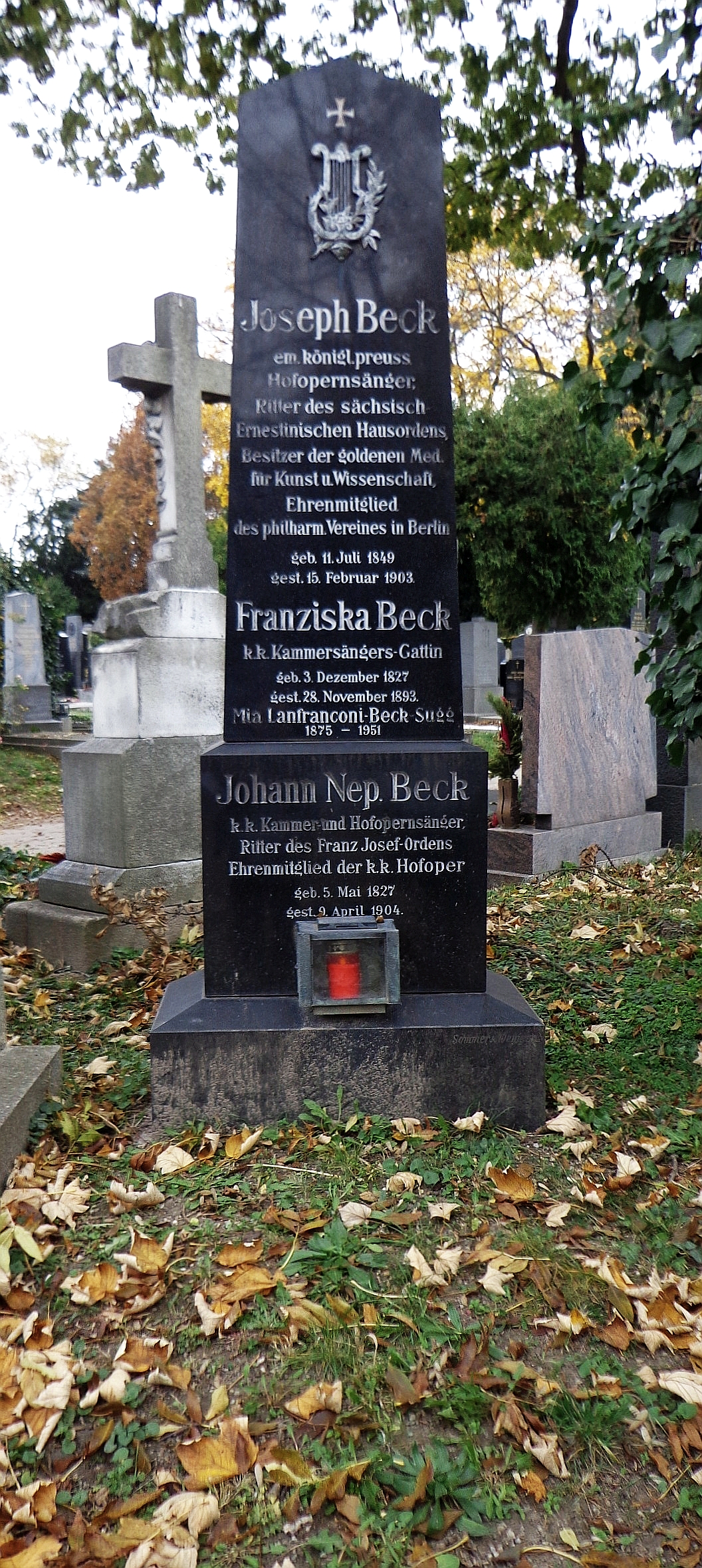 Wiener Zentralfriedhof - Gruppe 30E: Grab der Opernsänger Joseph Beck und Johann Nepomuk Beck